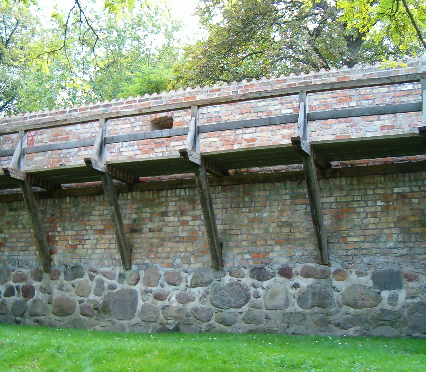 Rostock, Wehrgang